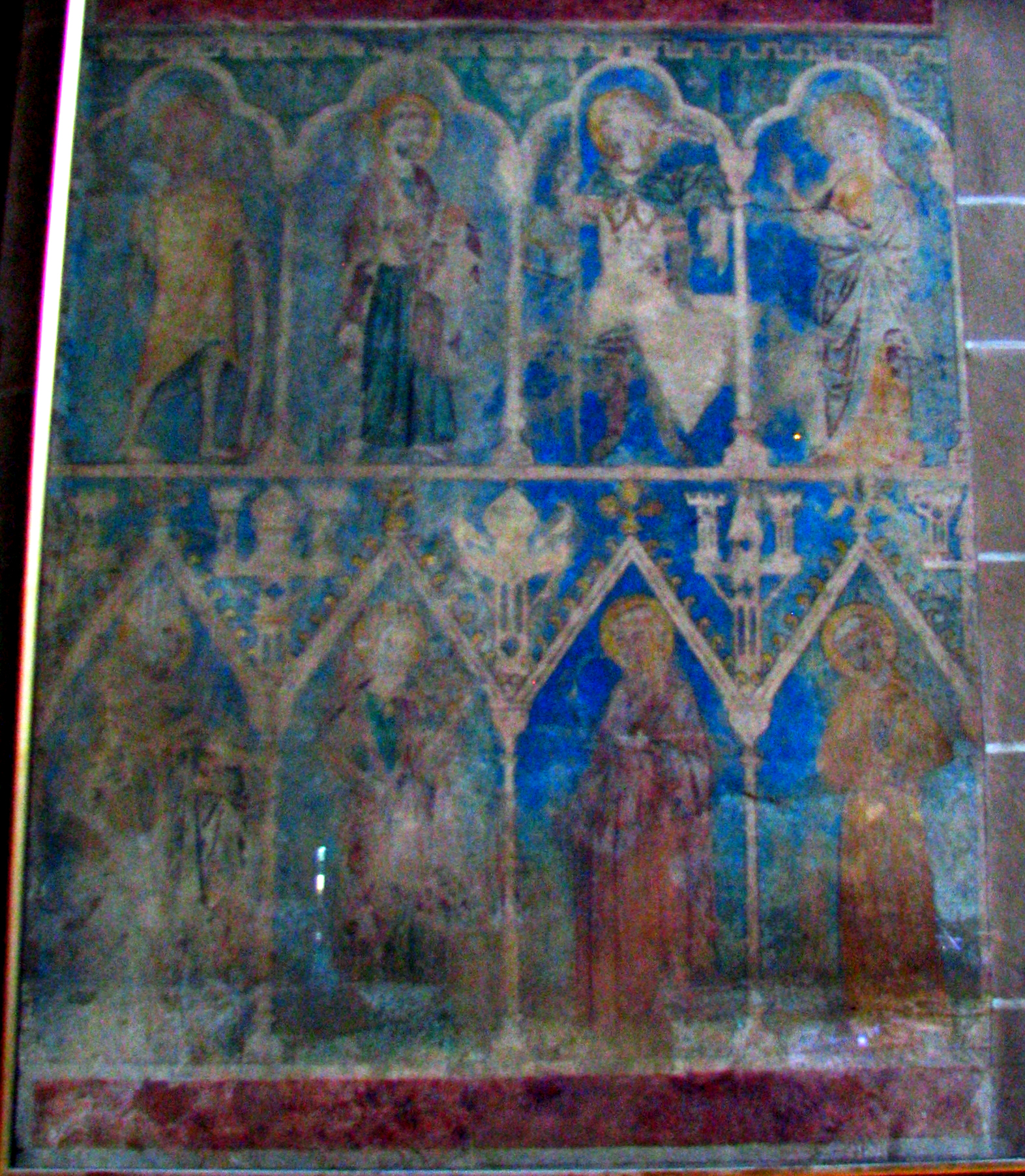 Dom Minden Bemalung rechter Vierlingpfeiler